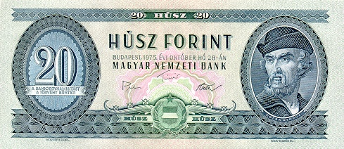 HUF 20 - obverse 1975